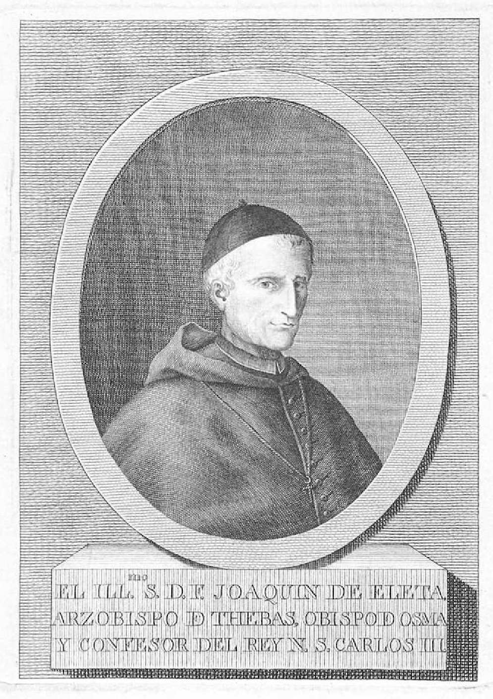 Joaquín de Eleta, ilustración de Descripción Histórica del Obispado de Osma con el catálogo de sus prelados por Don Juan Loperraez Corvalan ... ; tomo primero. Madrid, en la Imprenta Real, 1788